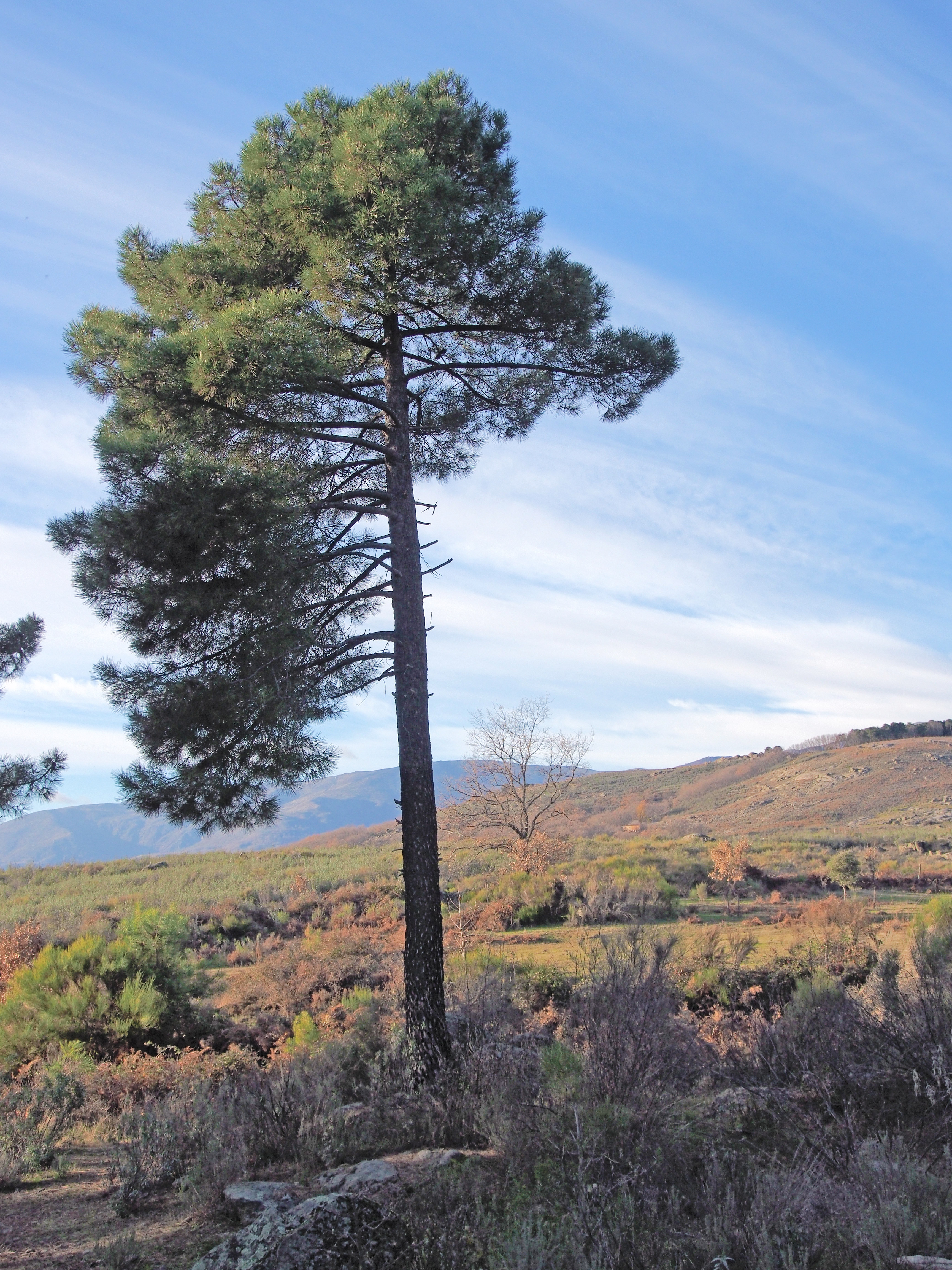 Pinus pinaster. Losar de la Vera (Cáceres, España).